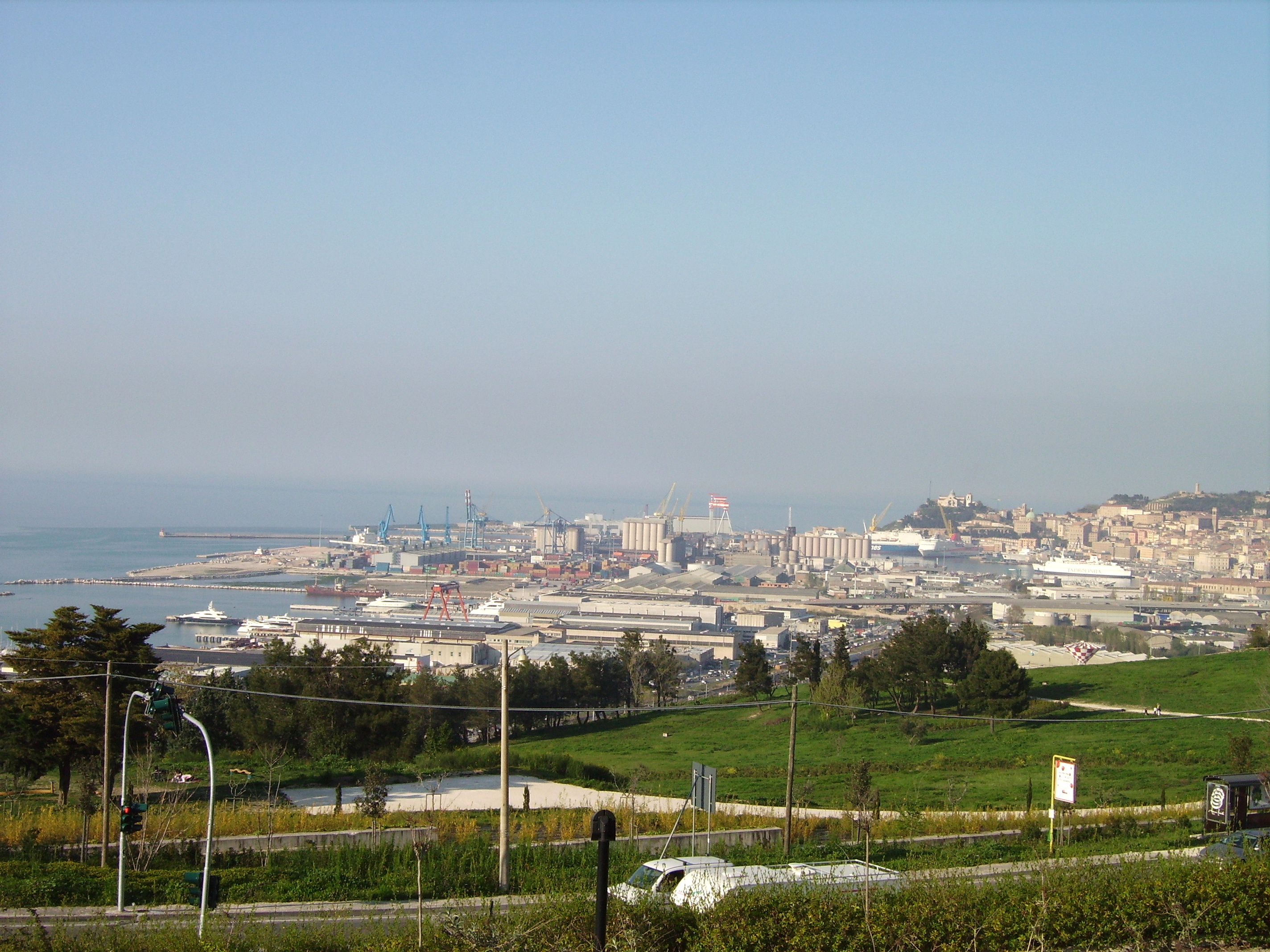 Veduta del porto di Ancona dal Belvedere di Posatora